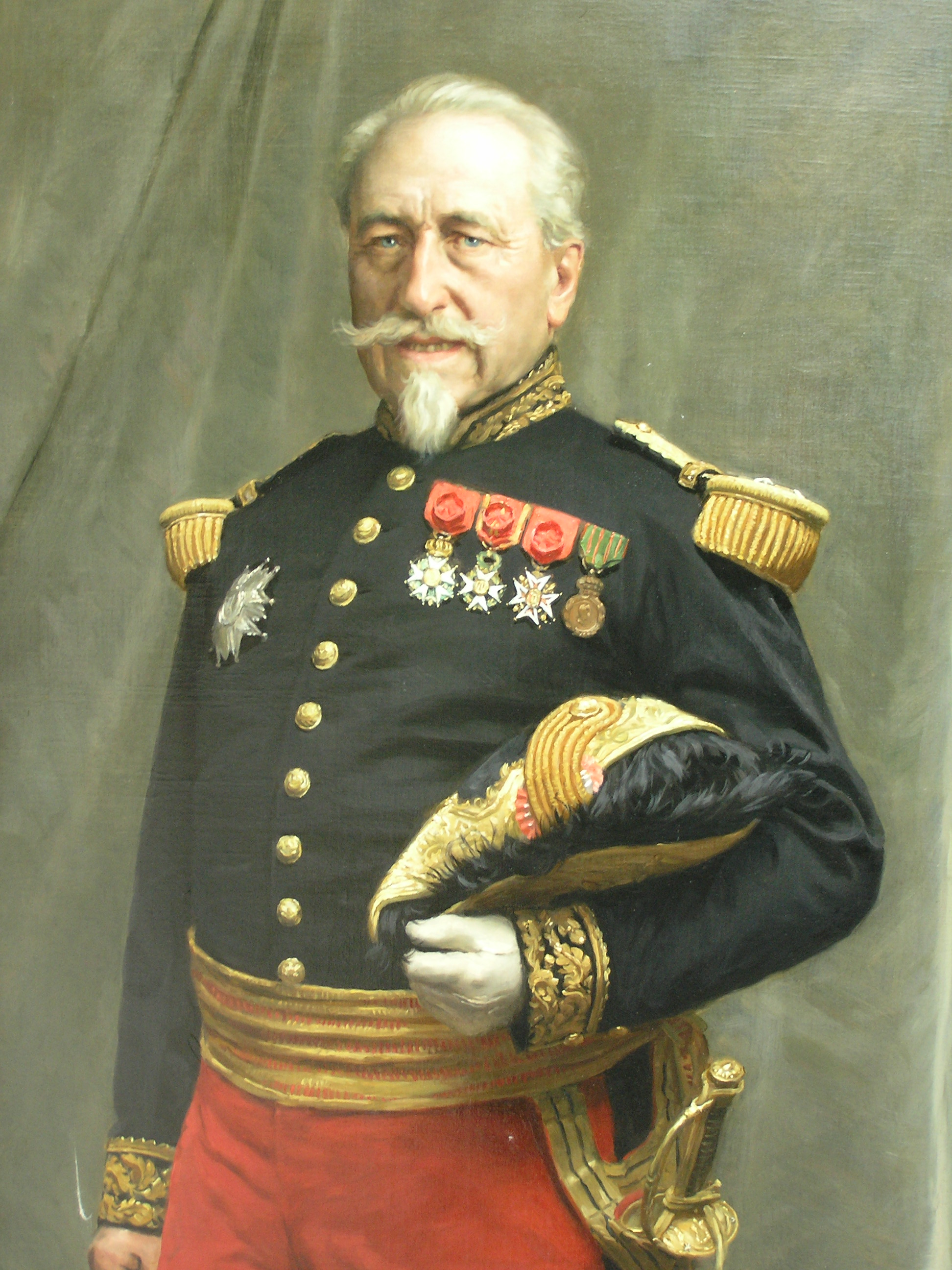 portrait de famille